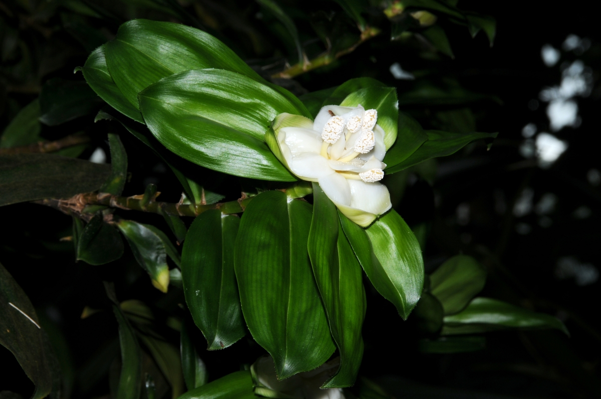 Freycinetia cf. elliptica, Palmengarten, Frankfurt am Main, Hessen, Deutschland